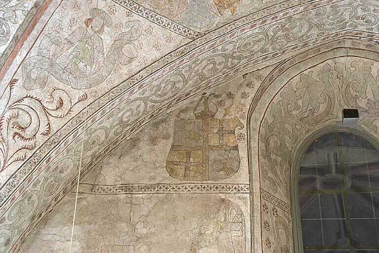 Kalkmålning, östra väggen, Jakob Ulvssons (örnfot) ärkebiskopsvapen i bildens mitt. Motiv: Nederluleå kyrka Nyckelord: Riksintressen, Världsarv Kategori: (03) Kalkmålningar Kalkmålning, östra väggen, Jakob Ulvssons (örnfot) ärkebiskopsvapen i bildens mitt.